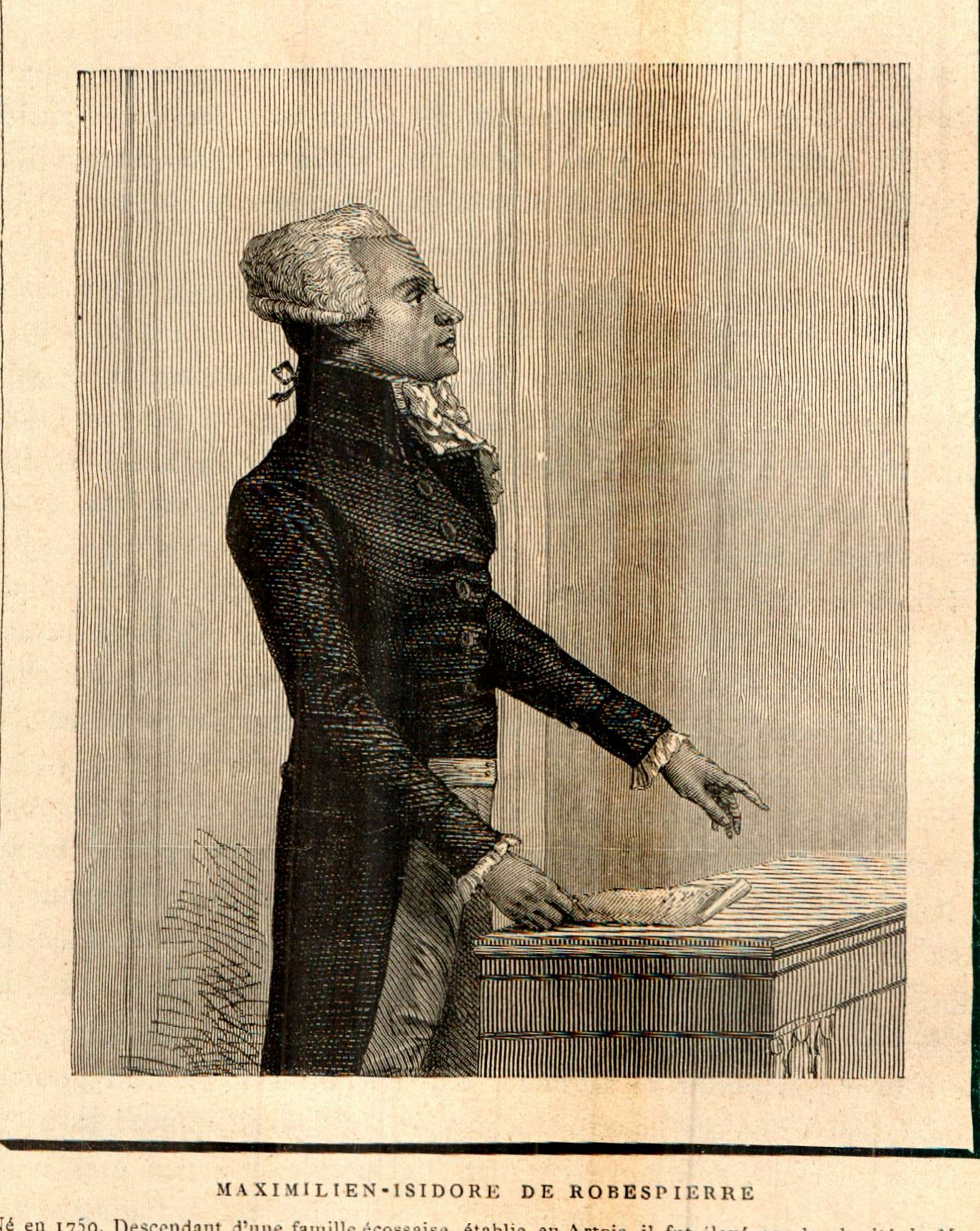 Représentation de Robespierre par un auteur inconnu , extraite de La France Révolutionnaire d'Héricault -Paris,1889